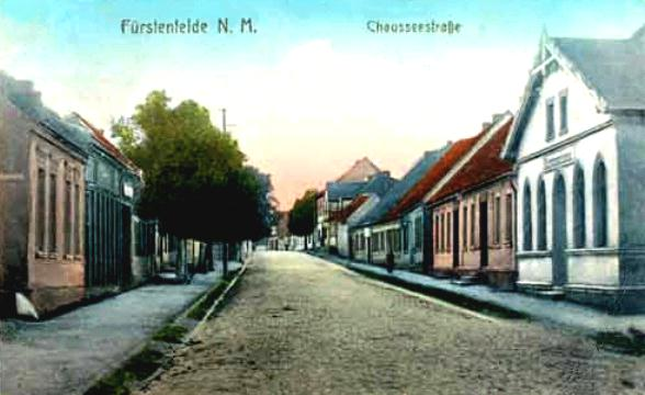 Fürstenfelde, Neumark about 1900